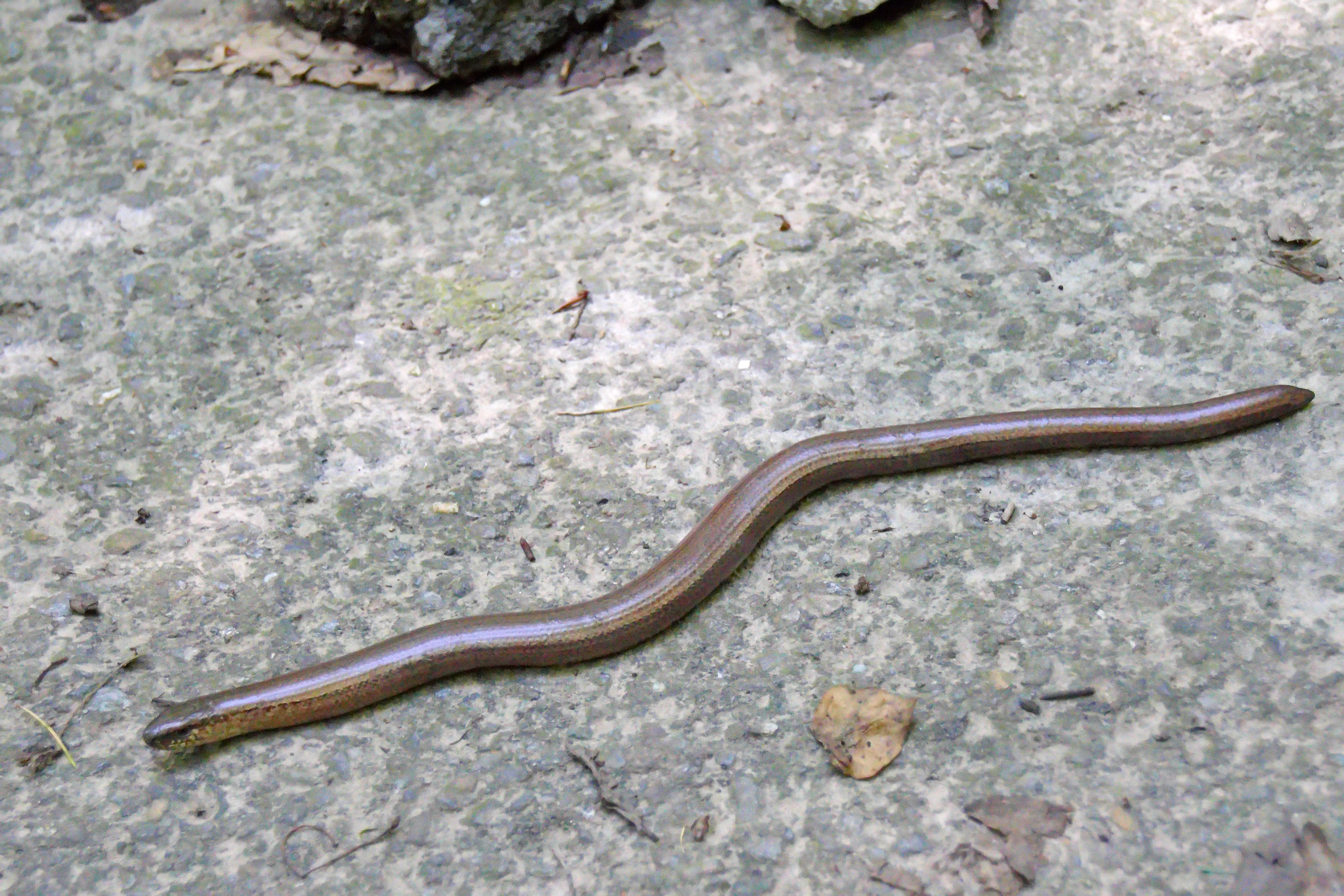 Blindschleiche (Anguis fragilis) bei Hameln-Welliehausen auf der Hohe Egge (Süntel) im Landschaftsschutzgebiet Süntel, Niedersachsen, Deutschland